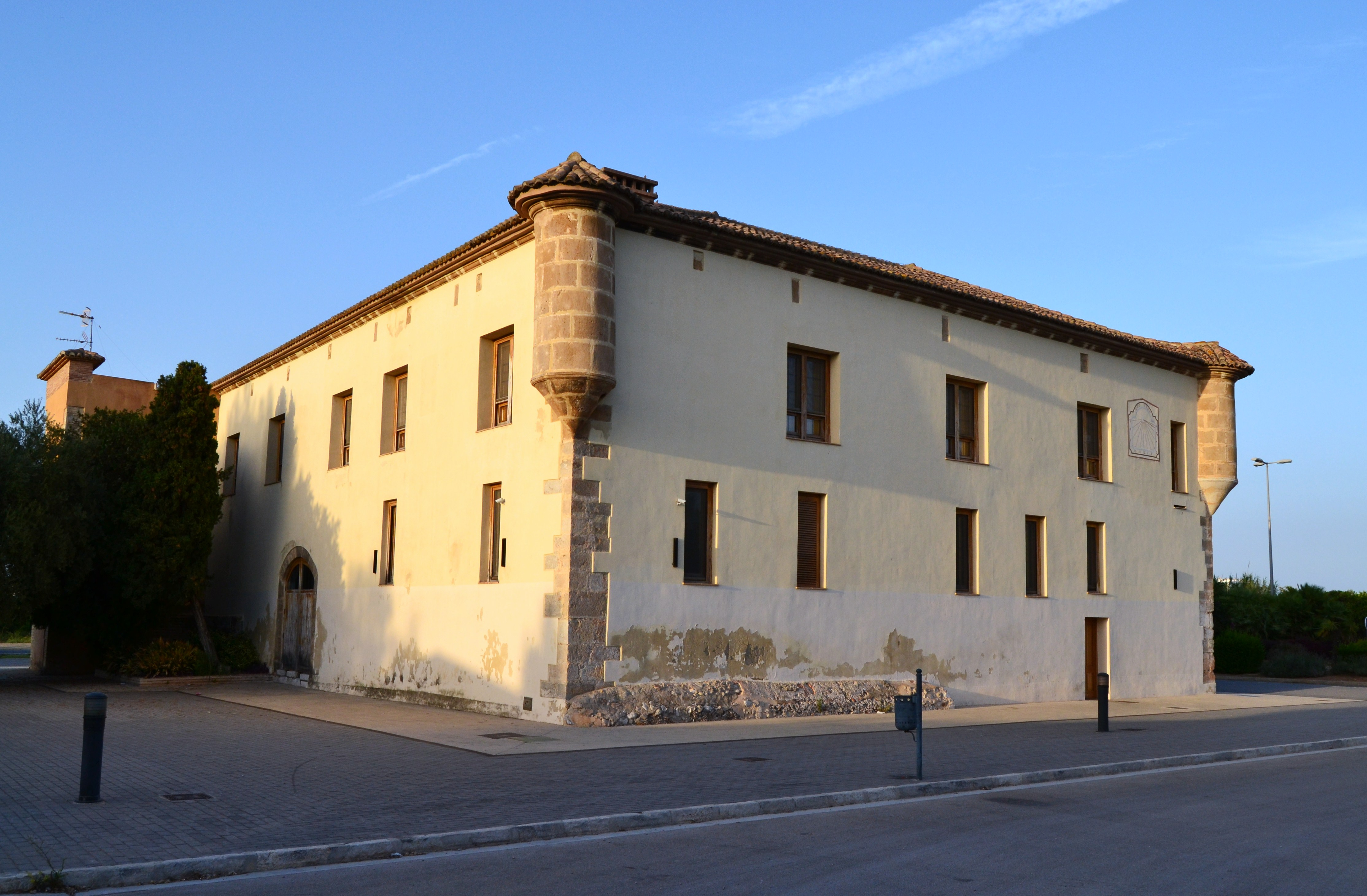 Alqueria del Duc de Gandia.